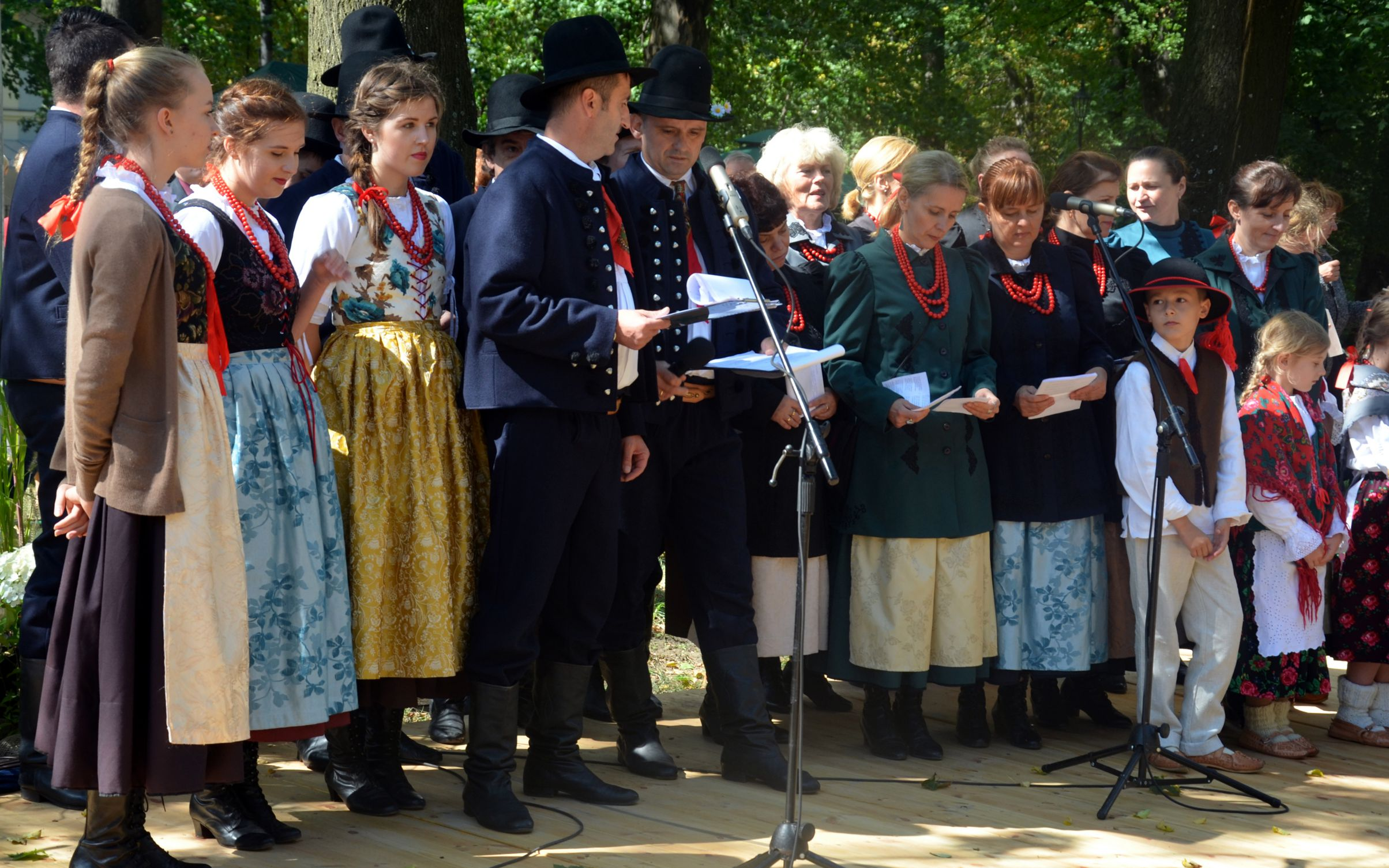 Erntedankfer Kozy - Bauerntrachten